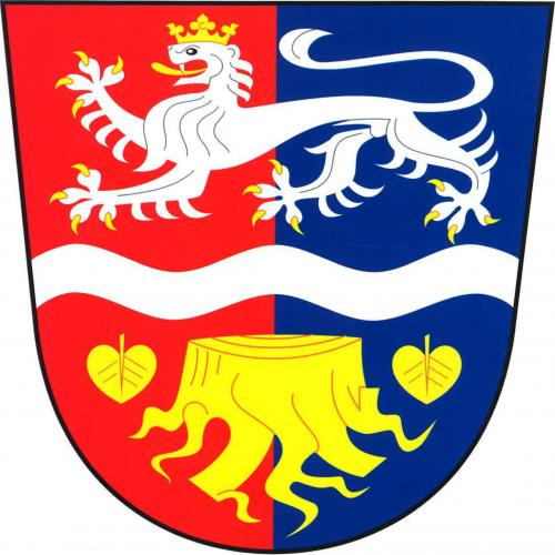 Vodranty znak